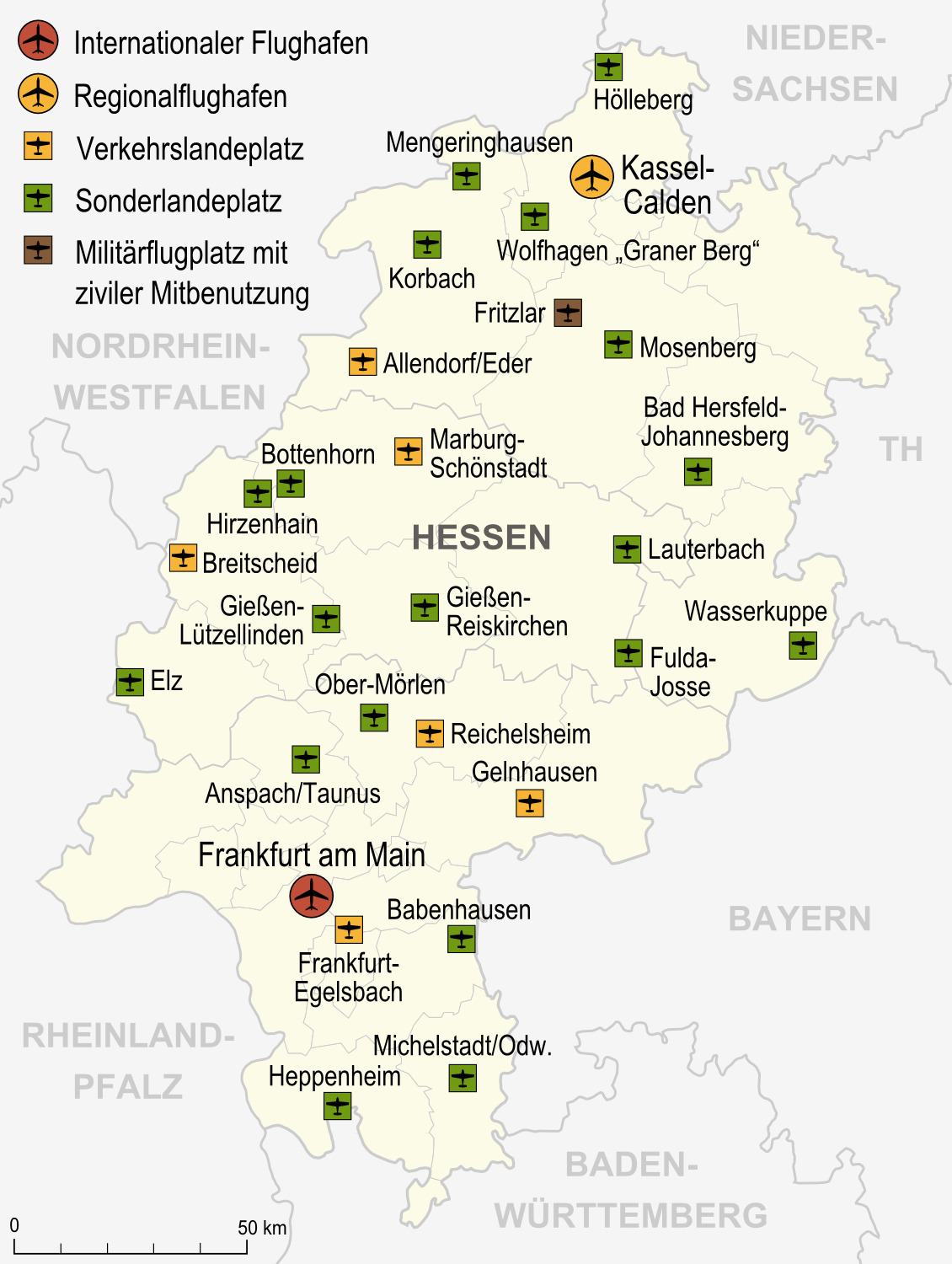 Flughäfen, Verkehrslandeplätze und Sonderlandeplätze in Hessen, Stand 2007